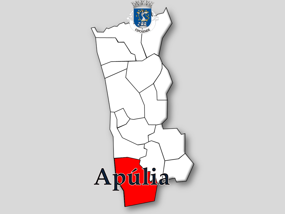 Censos 1864/2011